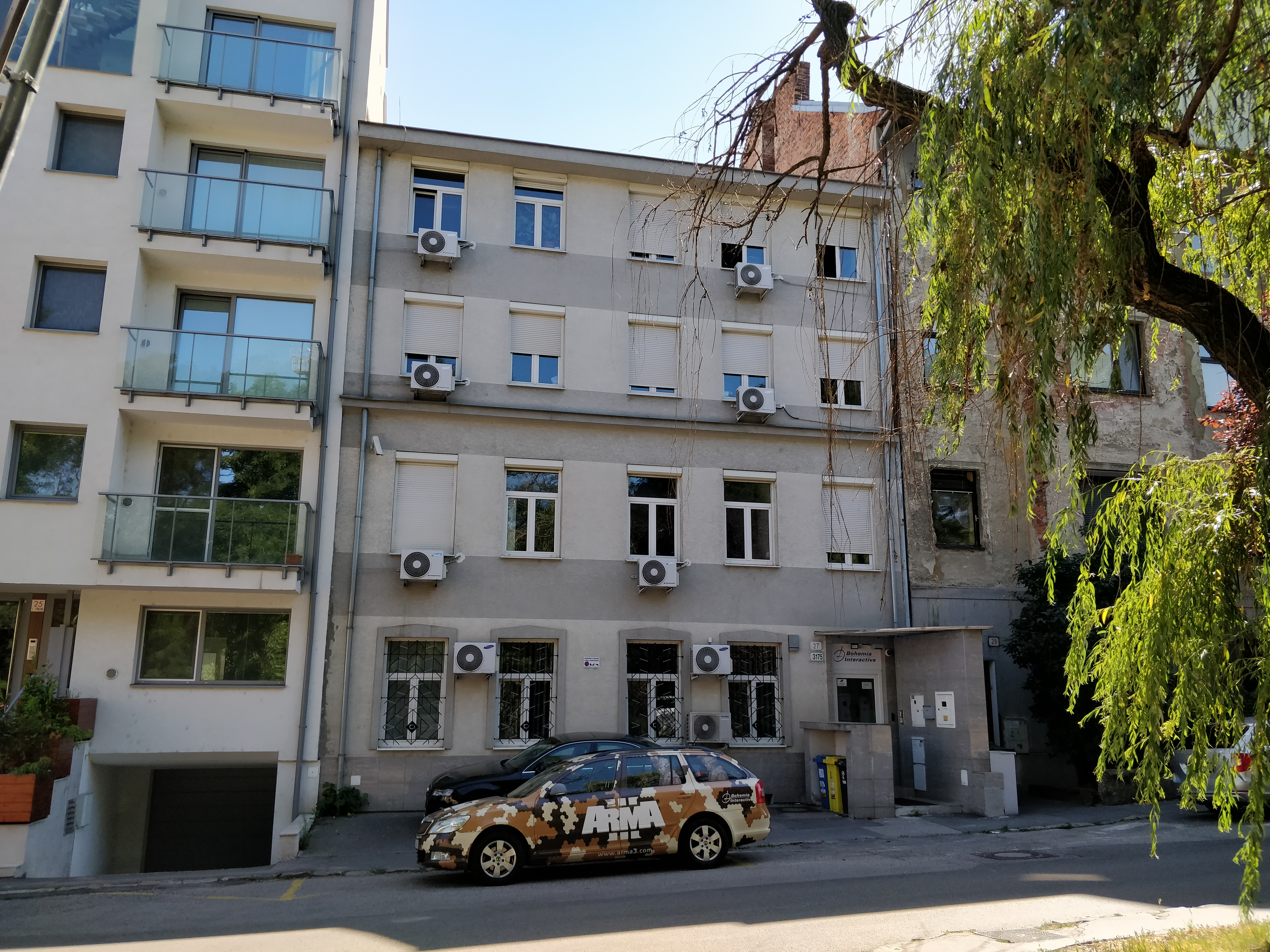 Palárikova 27, Bratislava